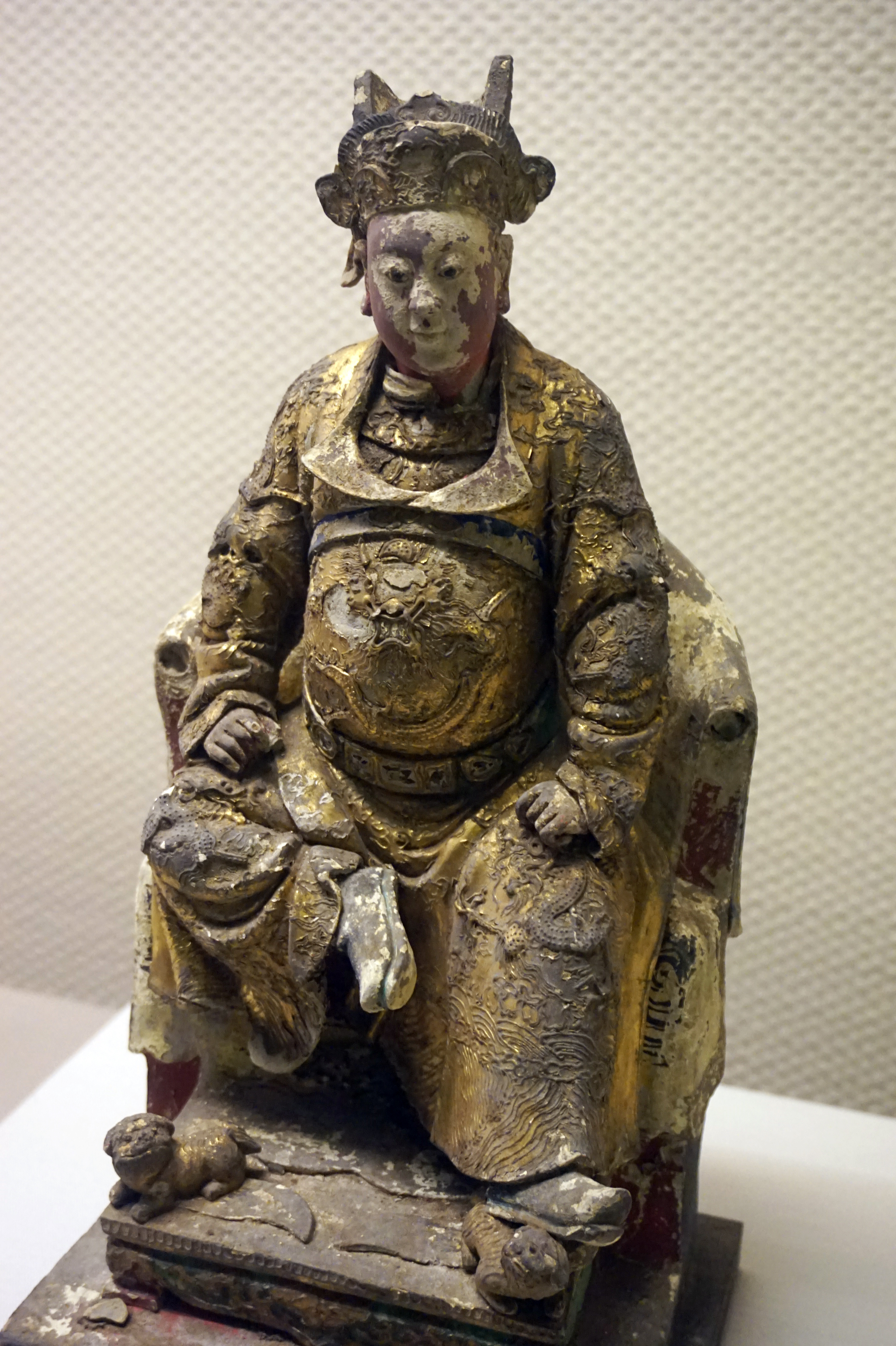 清福建泥塑广泽尊王坐像。中国闽台缘博物馆藏。